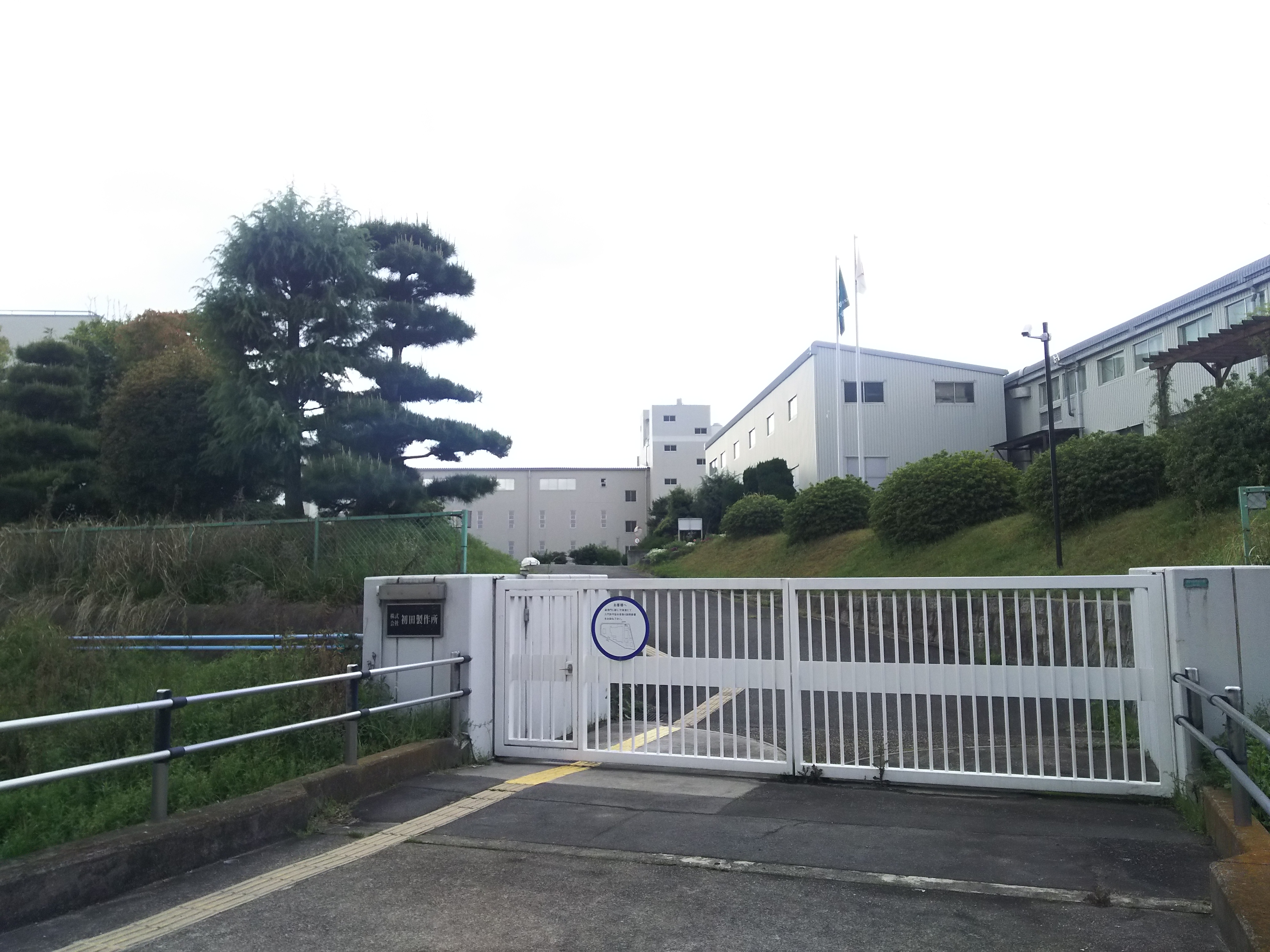 初田製作所本社正門（大阪府枚方市）